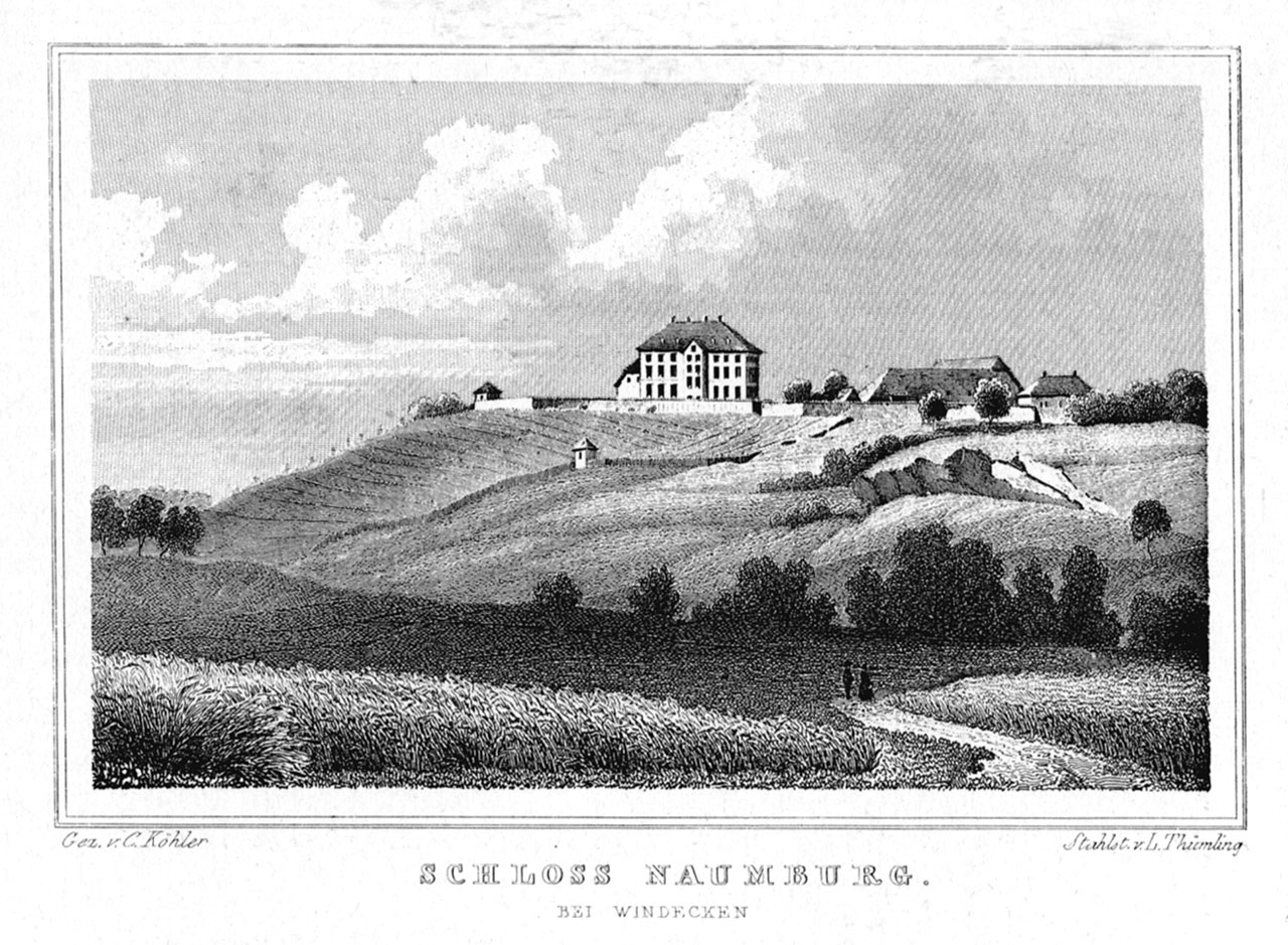 SCHLOSS NAUMBURG/BEI WINDECKEN/Gez. v. C. Köhler/Stahlst. v. L. Thümling, aus : Alois Henninger: Das Kurfürstenthum Hessen in malerischen Original Ansichten: in Stahl gestochen von verschiedenen Künstlern; von einem historisch topographischen Text begleitet. Darmstadt : Lange, 1850, nach S. 552.